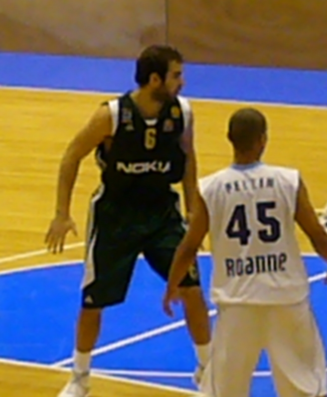 Le joueur grec Vassilis Spanoulis sous le maillot du Panathinaikos en novembre 2007 (Clermont-Ferrand)